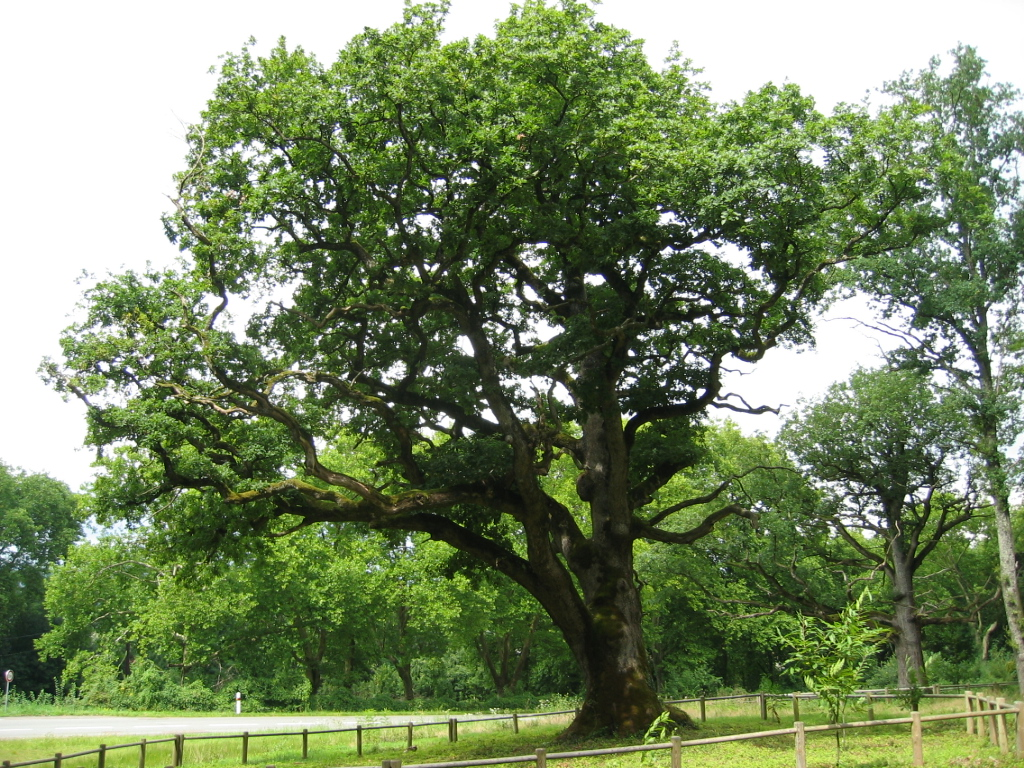 Chêne Quercus petraea de la commune de Rigney dans le Doubs agé d'environs 300 ans